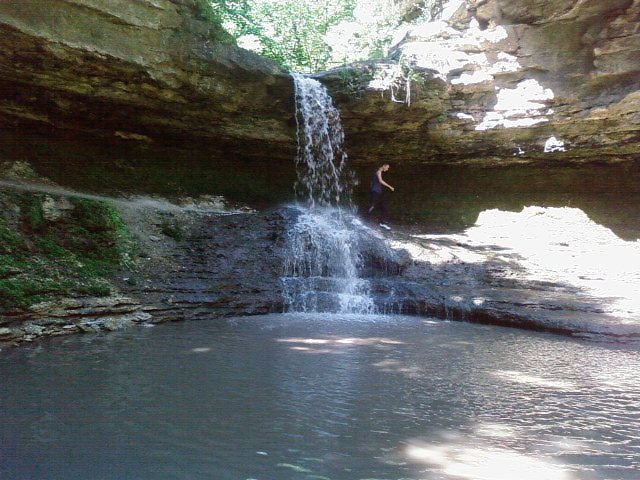 Cascada Saharna